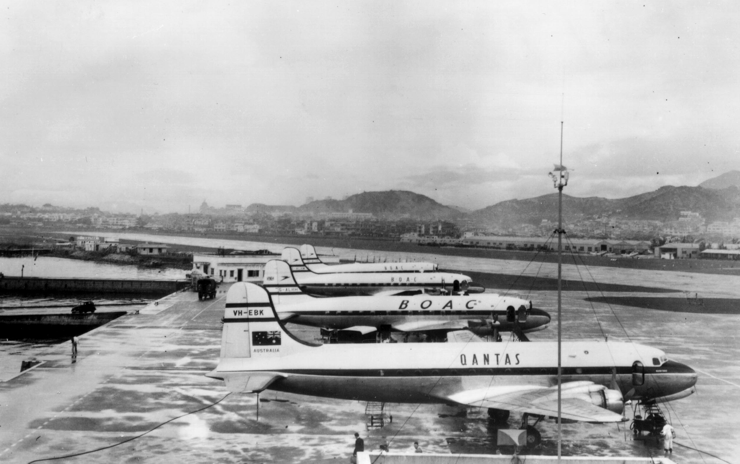 Kai Tak Airport, 1958